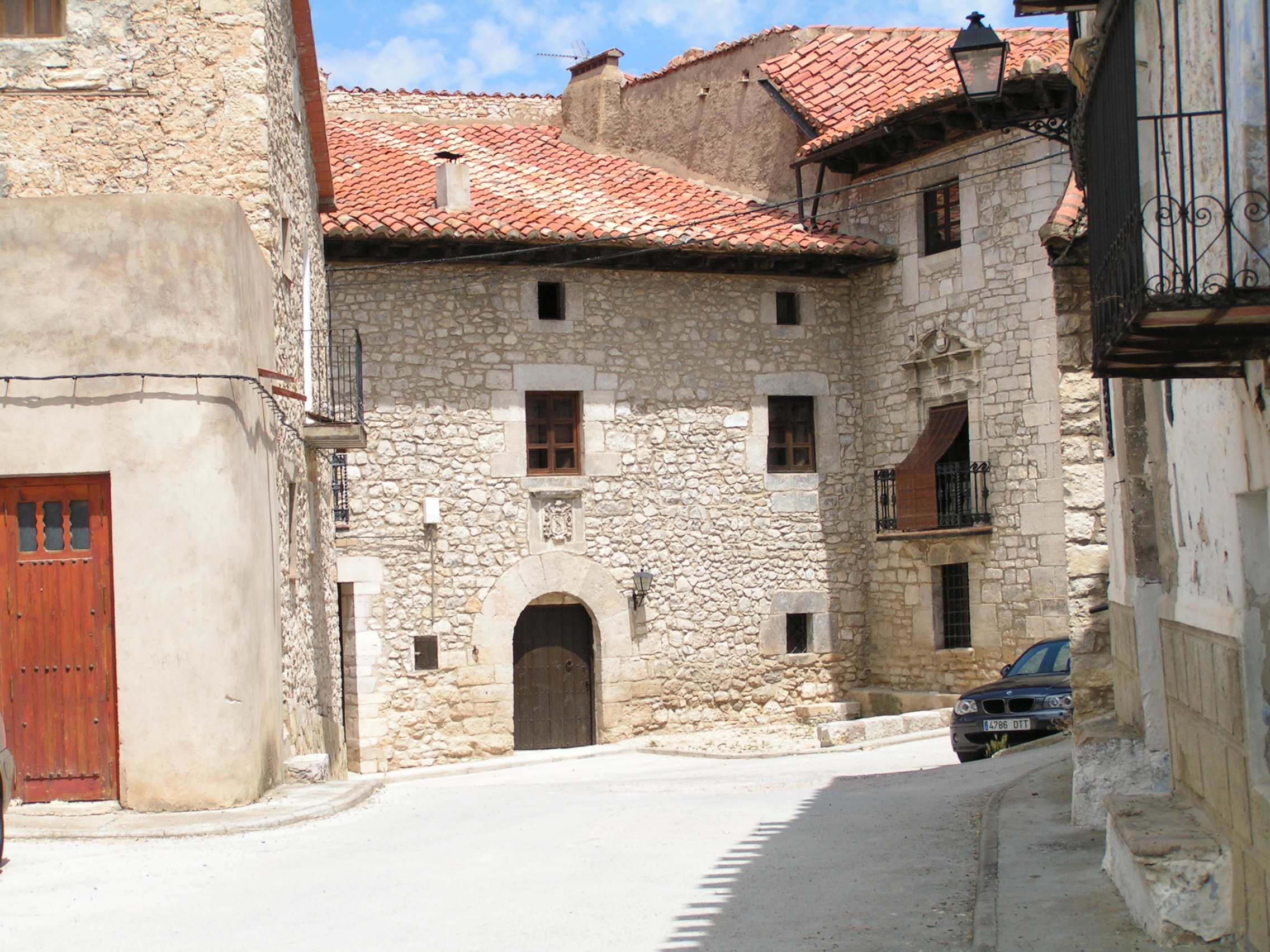 Fortanete: Casa dels ducs de Medinacelli